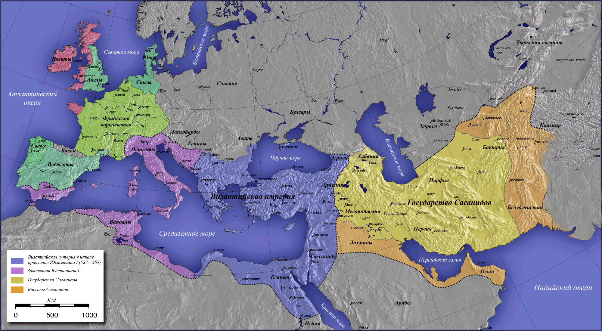 Завоевания Юстиниана I, 527—565